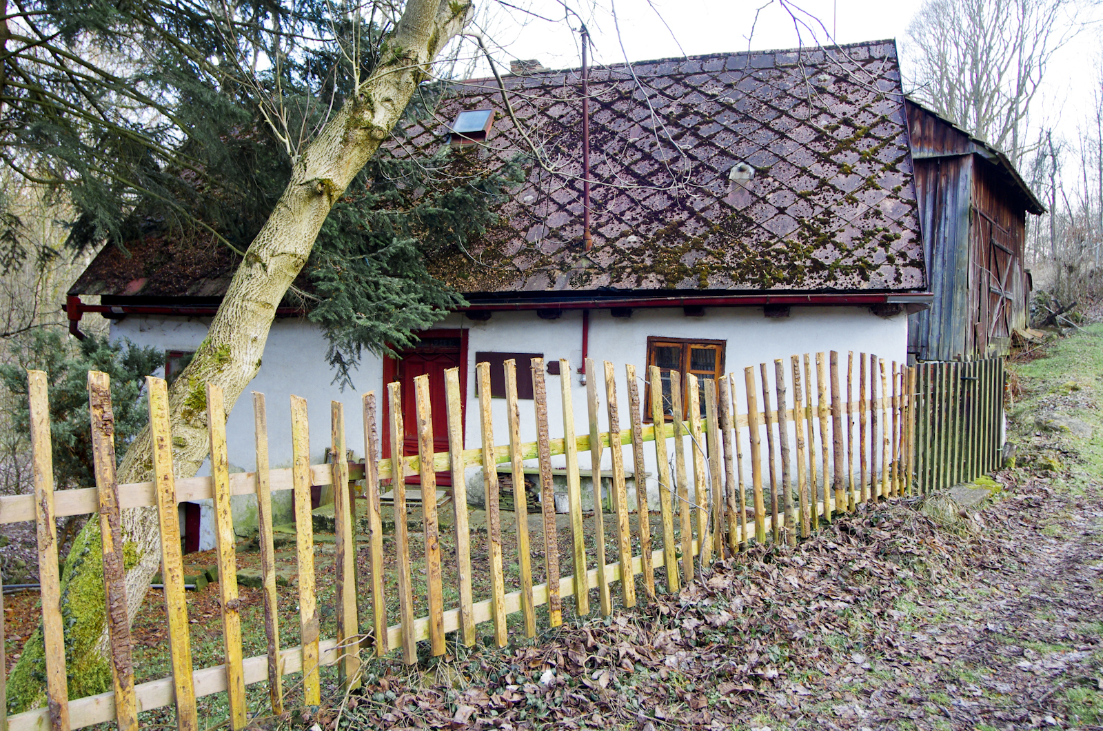 chalupa v Hrádku u Krajkové, na okraji obce u Habartovského potoka, okres Sokolov